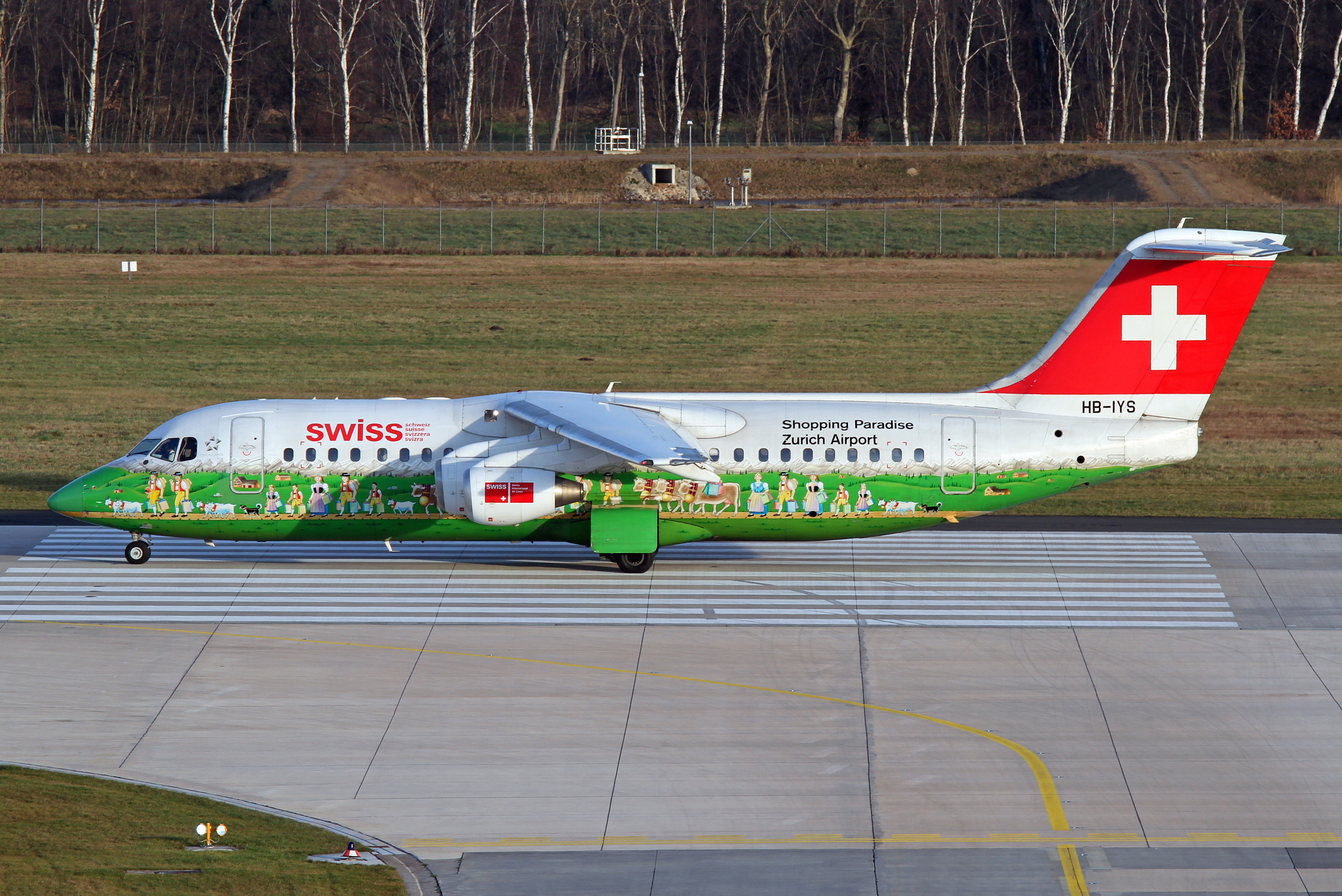 IMG_5180X